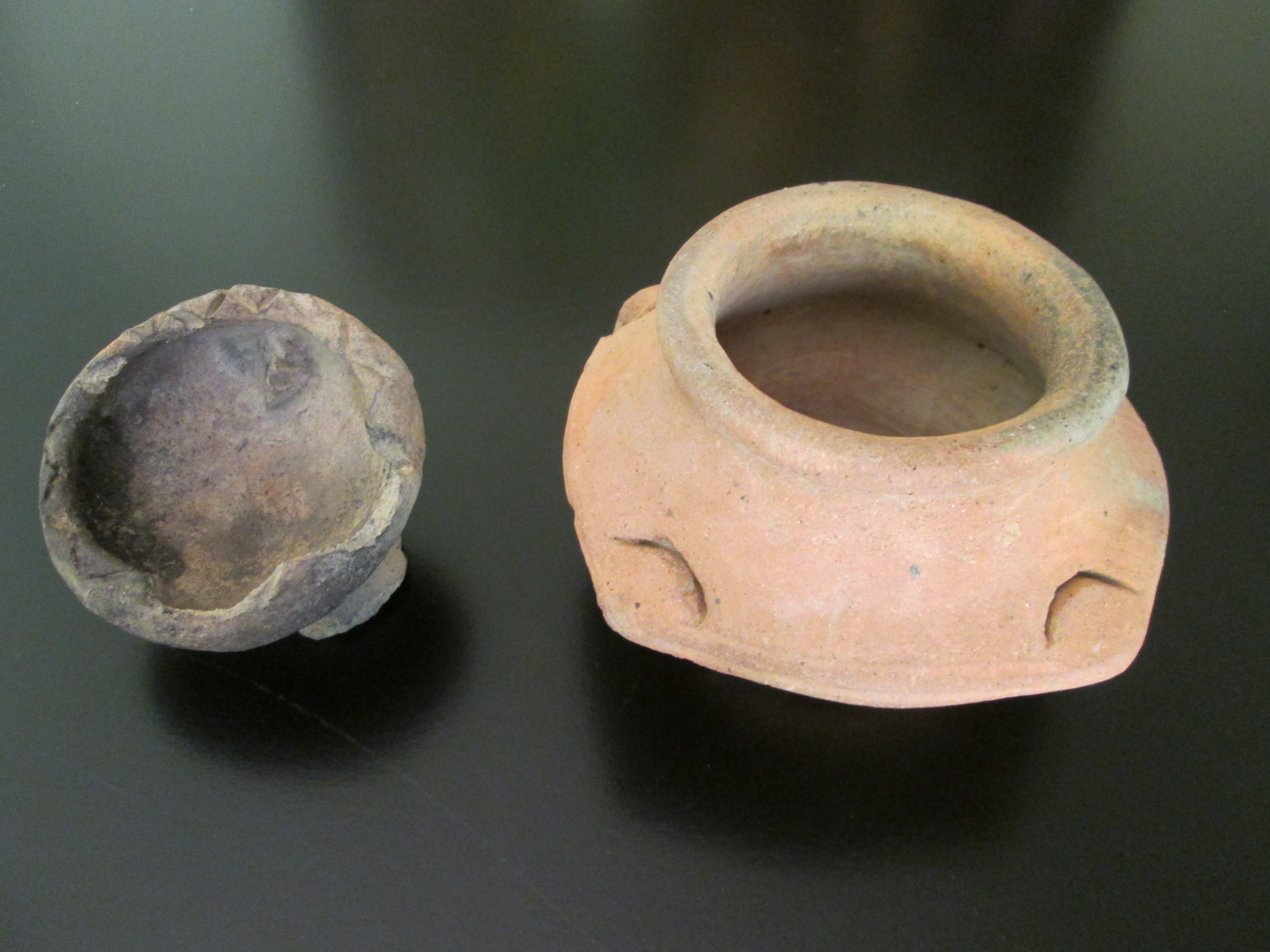 Vasijas encontradas en Remedia Pobre